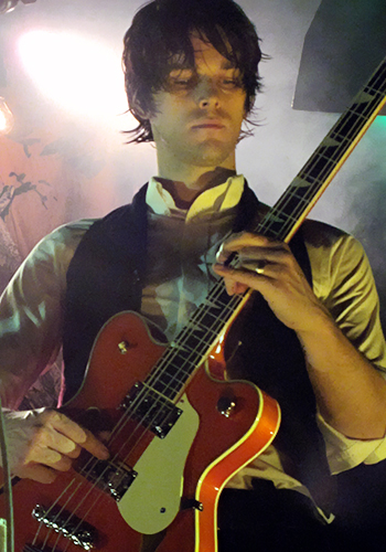 Dallon Weekes